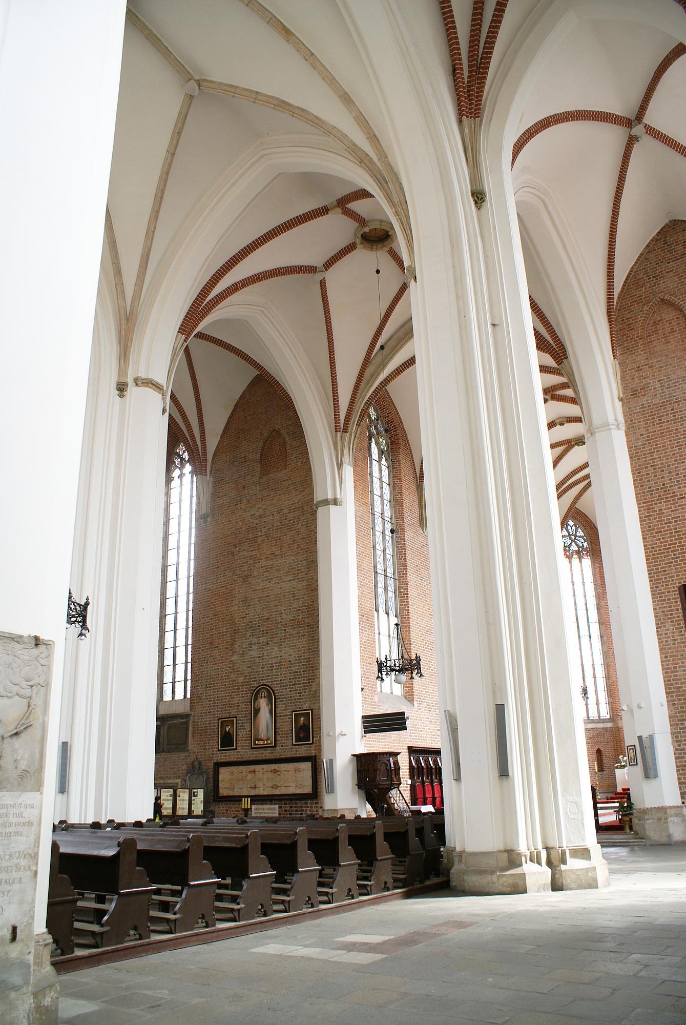 Wrocław, kościół p.w. Św. Krzyża, XII, XIV